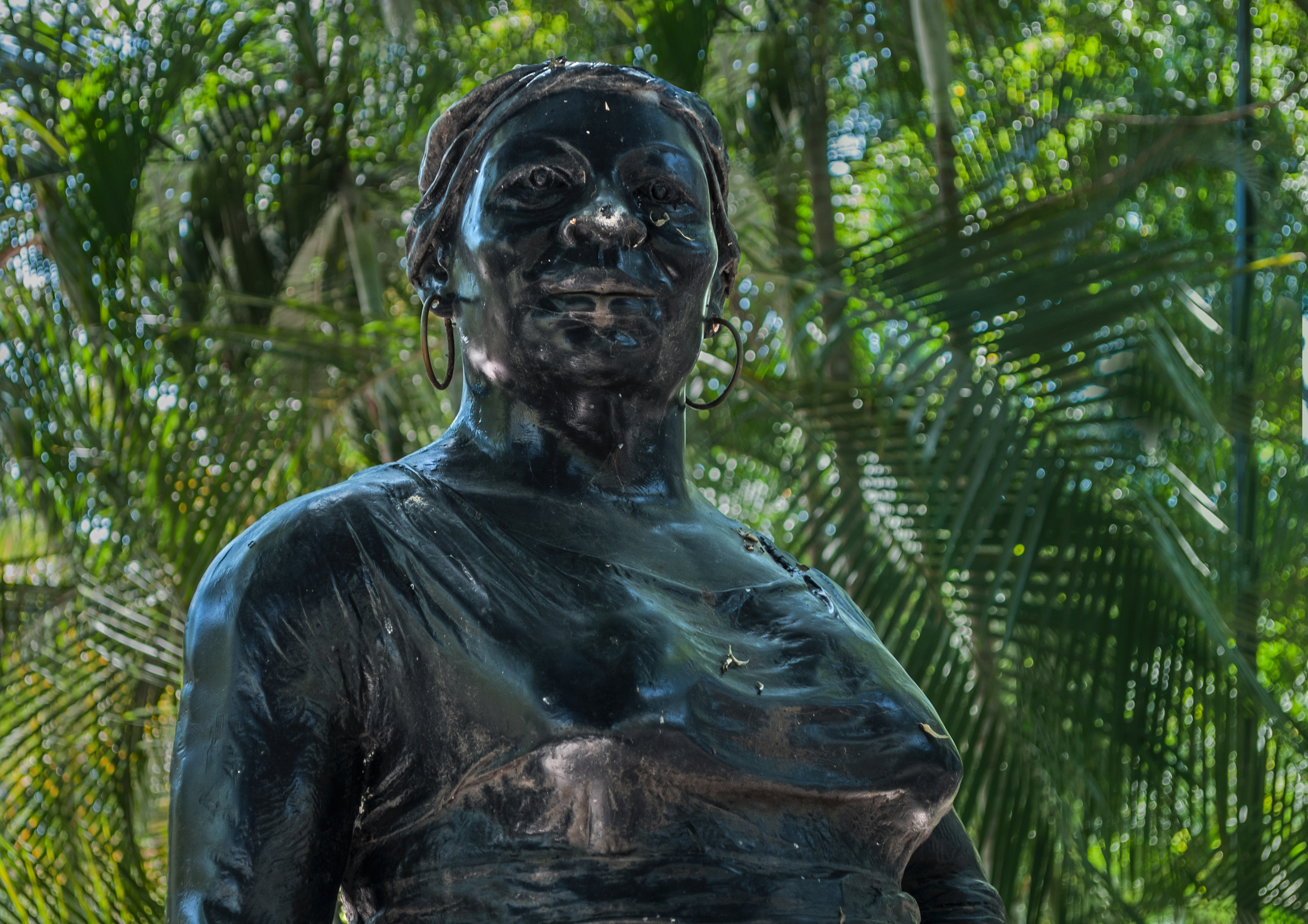 Negra Hipólita o Hipólita Bolívar, estatua en el parque que lleva su mismo nombre en la ciudad de Valencia, Estado Carabobo